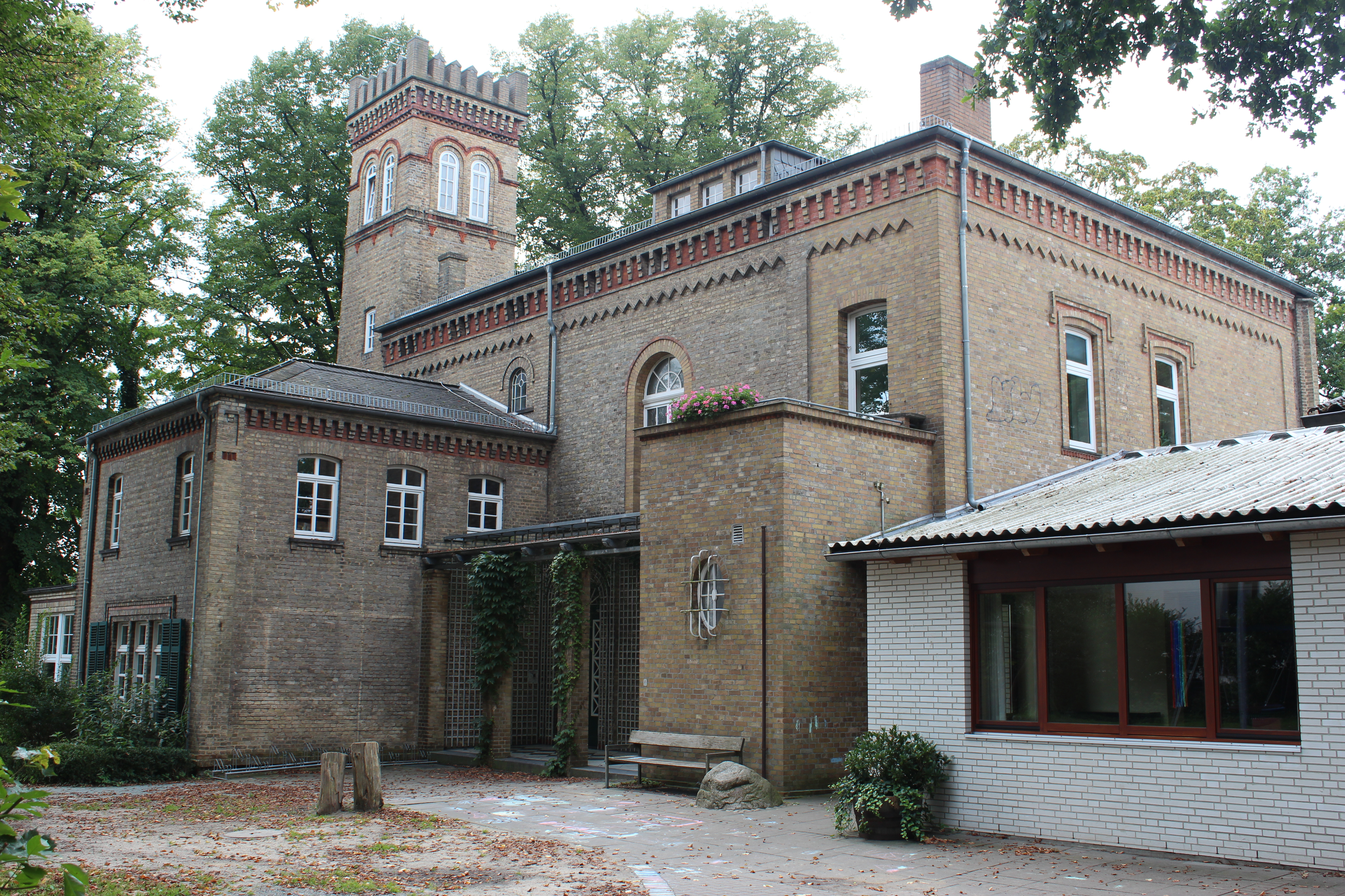 Haus Windeck in Bremen, Tidemanstraße 35.Das abgebildete Objekt ist ein geschütztes Kulturdenkmal in der Freien Hansestadt Bremen, mit der Nr. 1314 beim Landesamt für Denkmalpflege registriert.